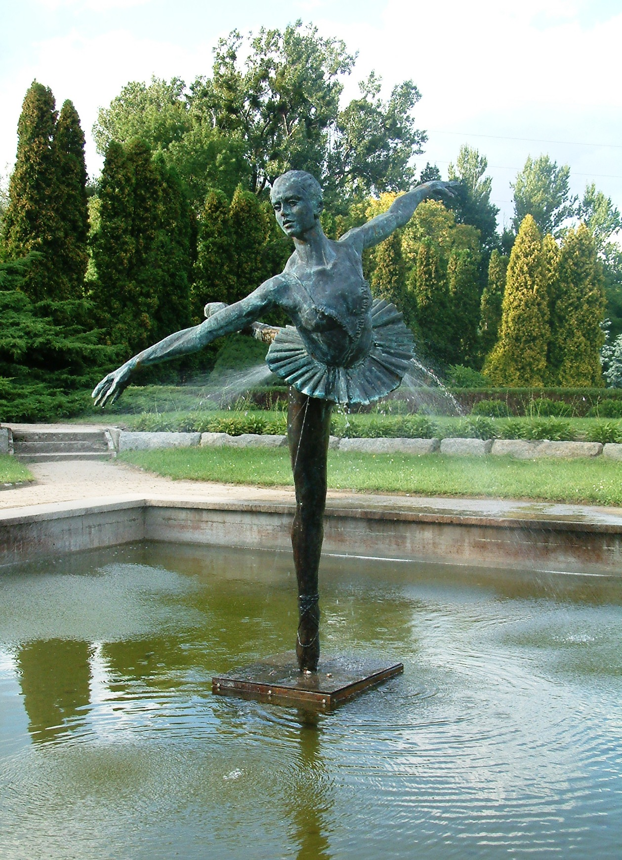 Botanical Garden in Poznań